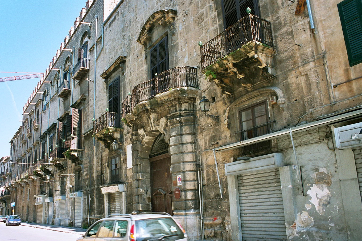 Palazzo Aiutamicristo, Palermo Main facade and righthand portal